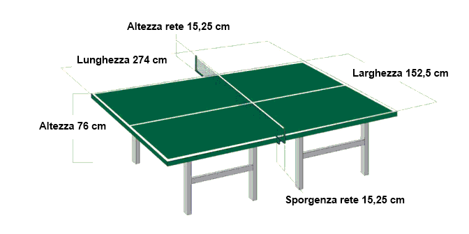 specifiche tavolo ping pong